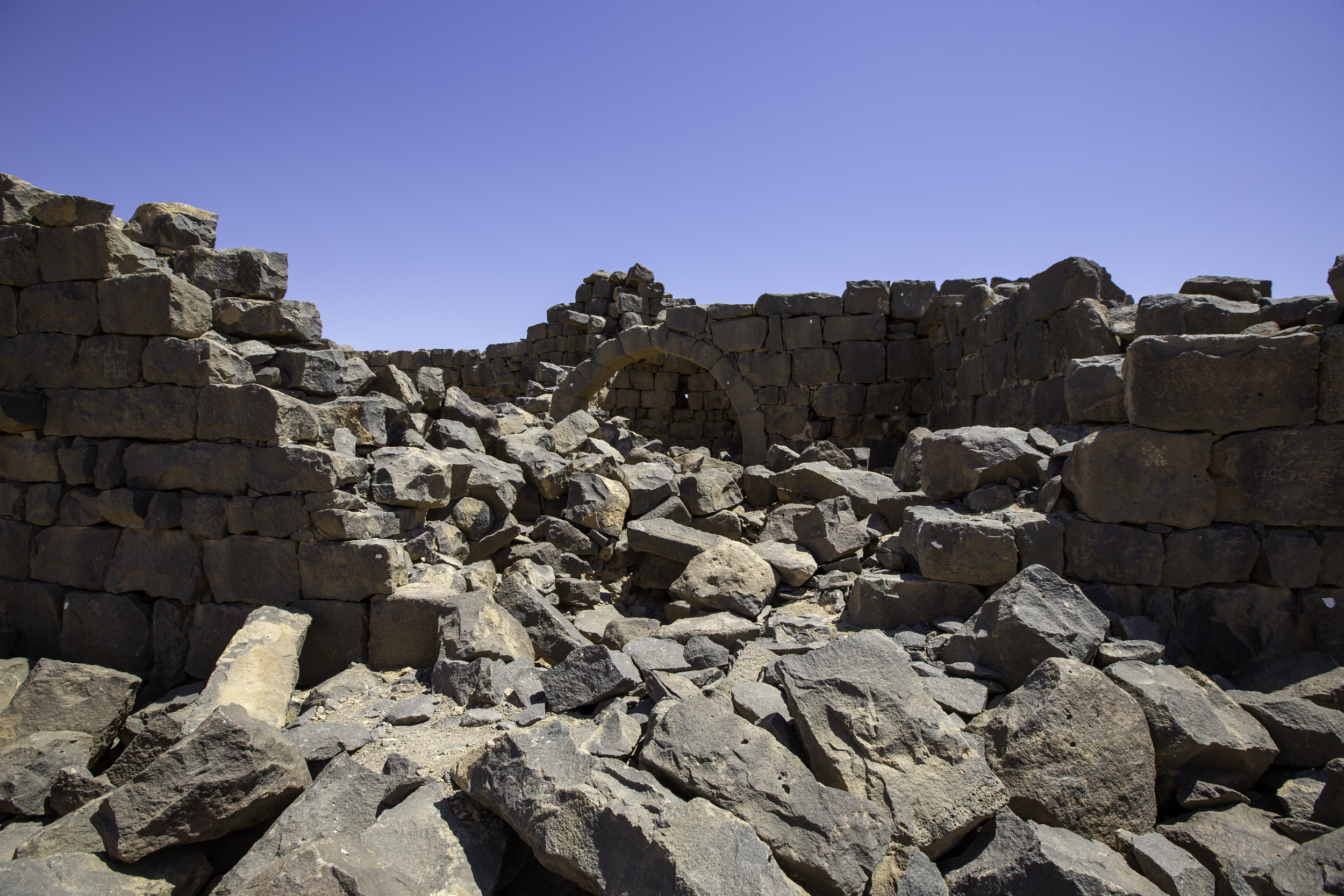 Qasr Burqu'